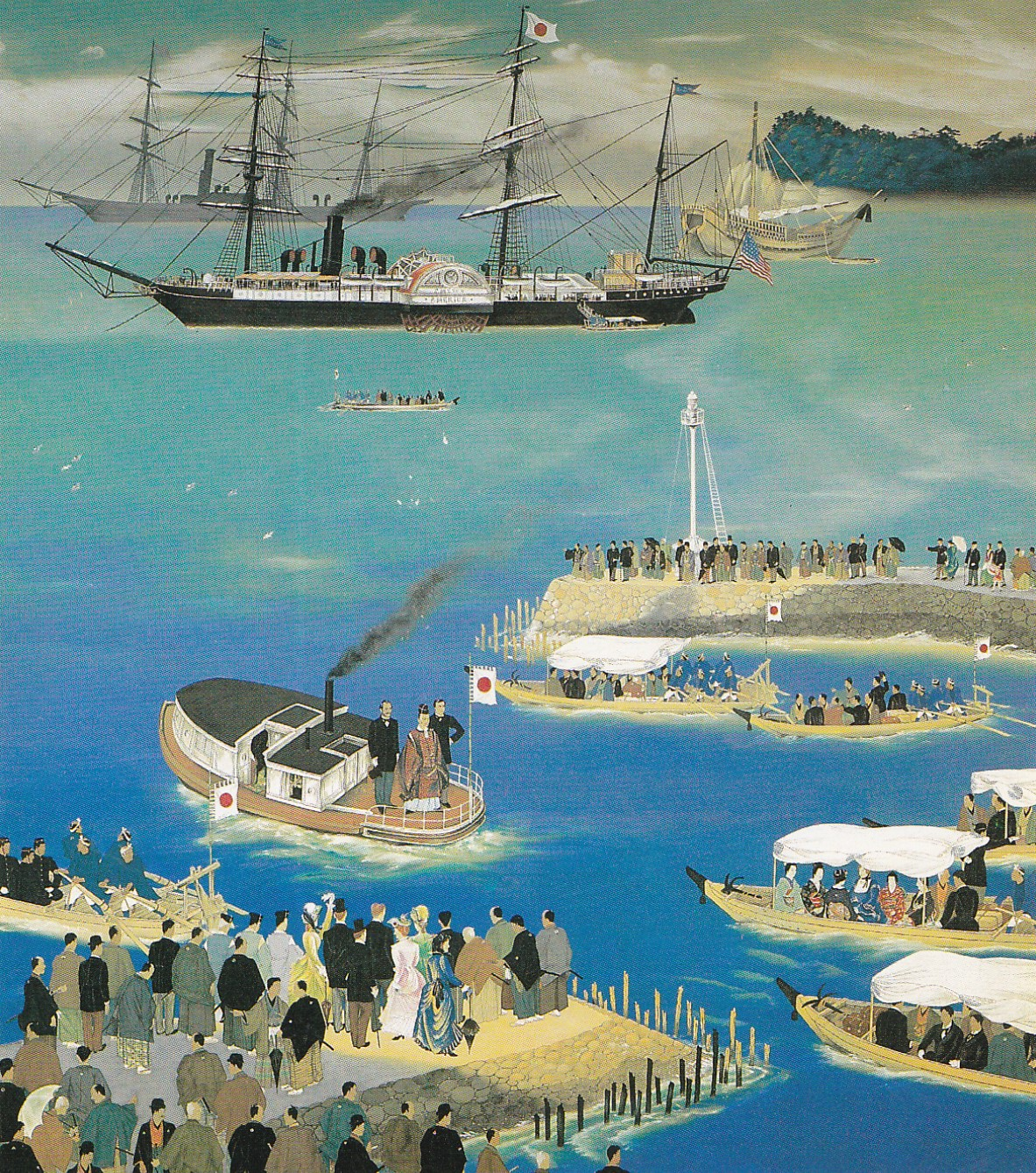 Aufbruch der Iwakuramission 1871